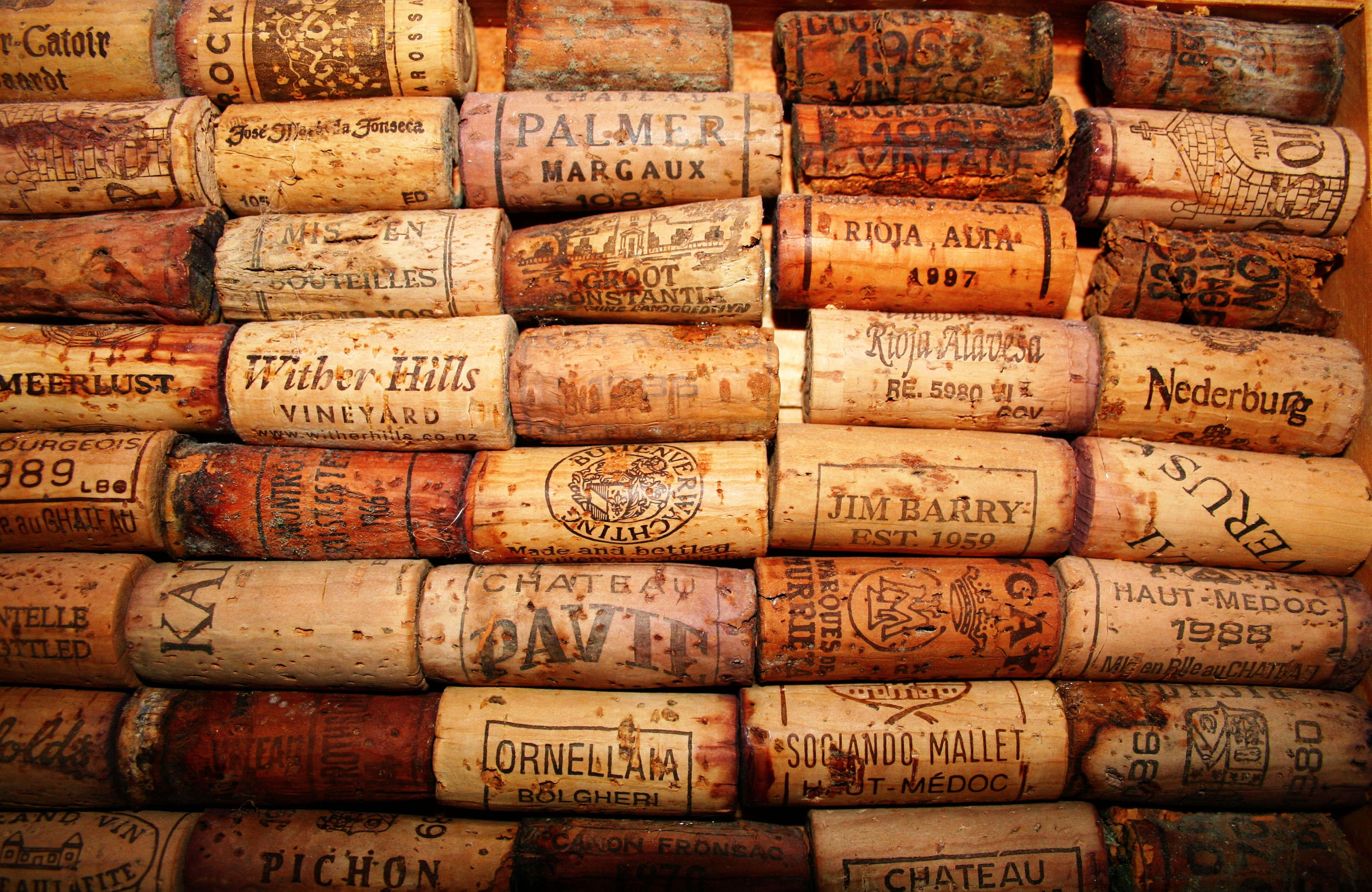 Korkensammlung (ca. von 10-50 Jahre alt)